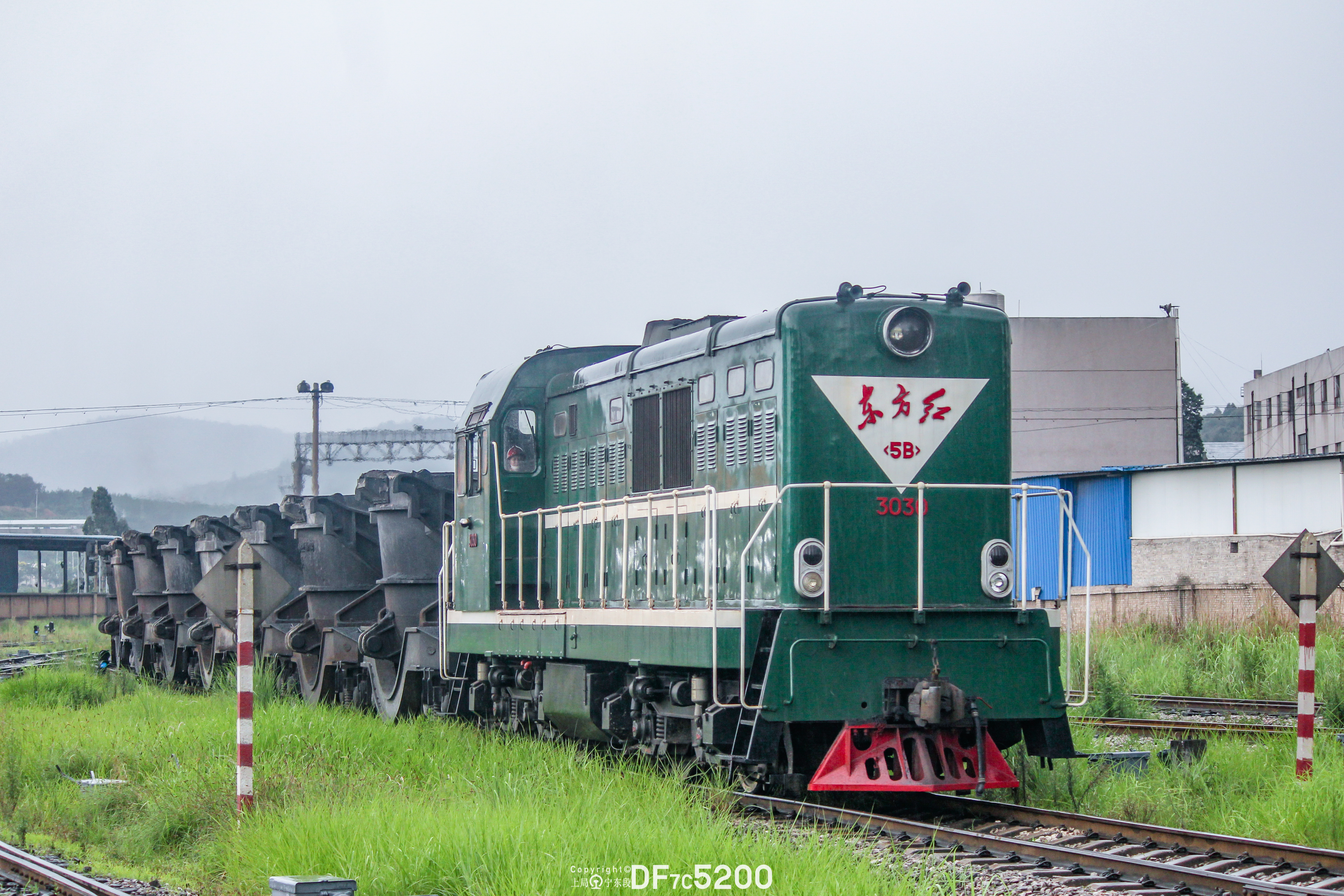 中文（中国大陆）: 昆钢购买的3030号东方红5B型机车